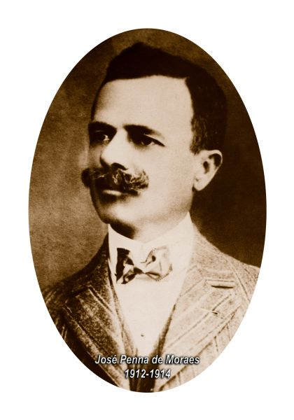 José Pena de Moraes